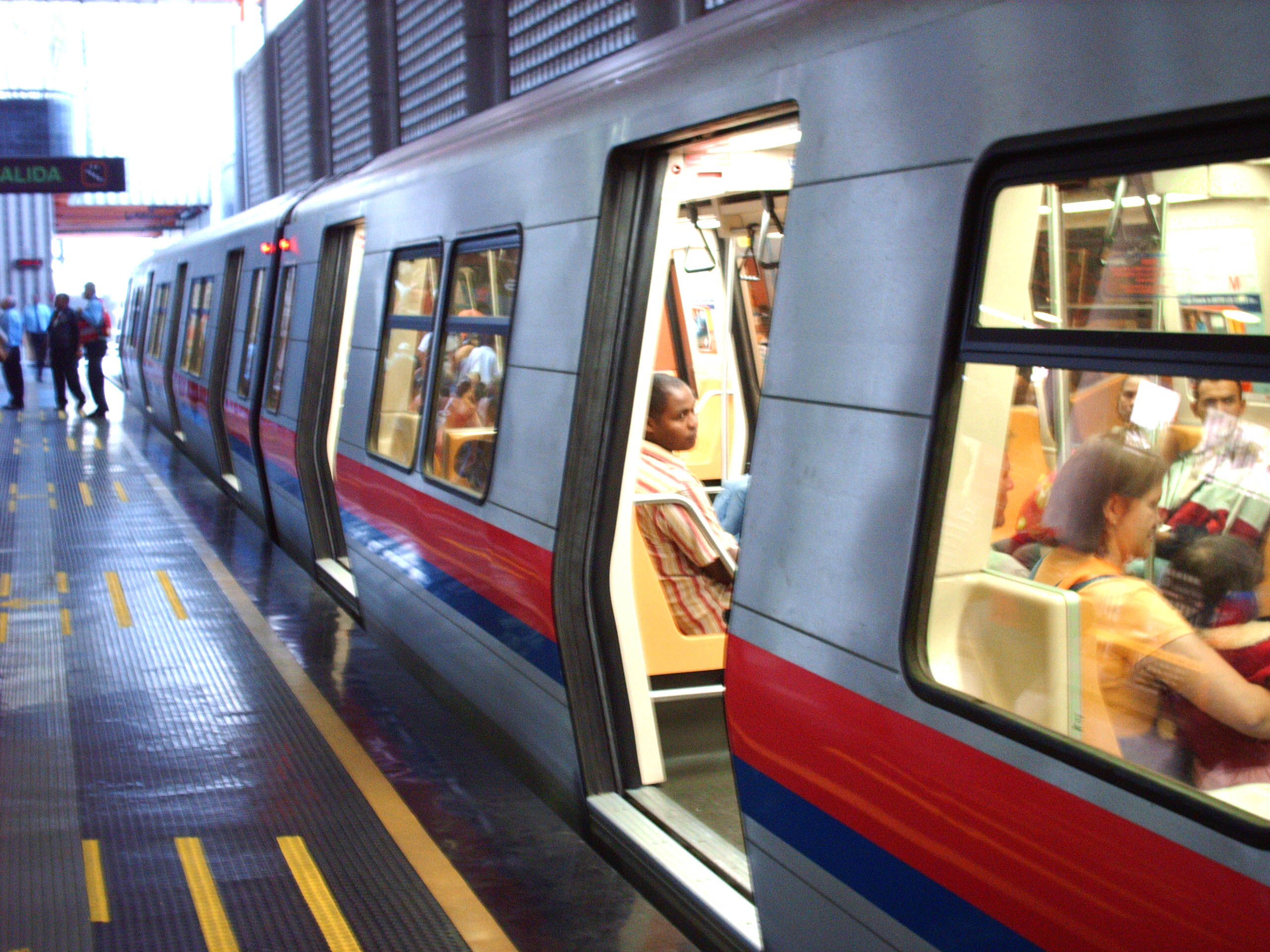 Vagones del Metro Los Teques